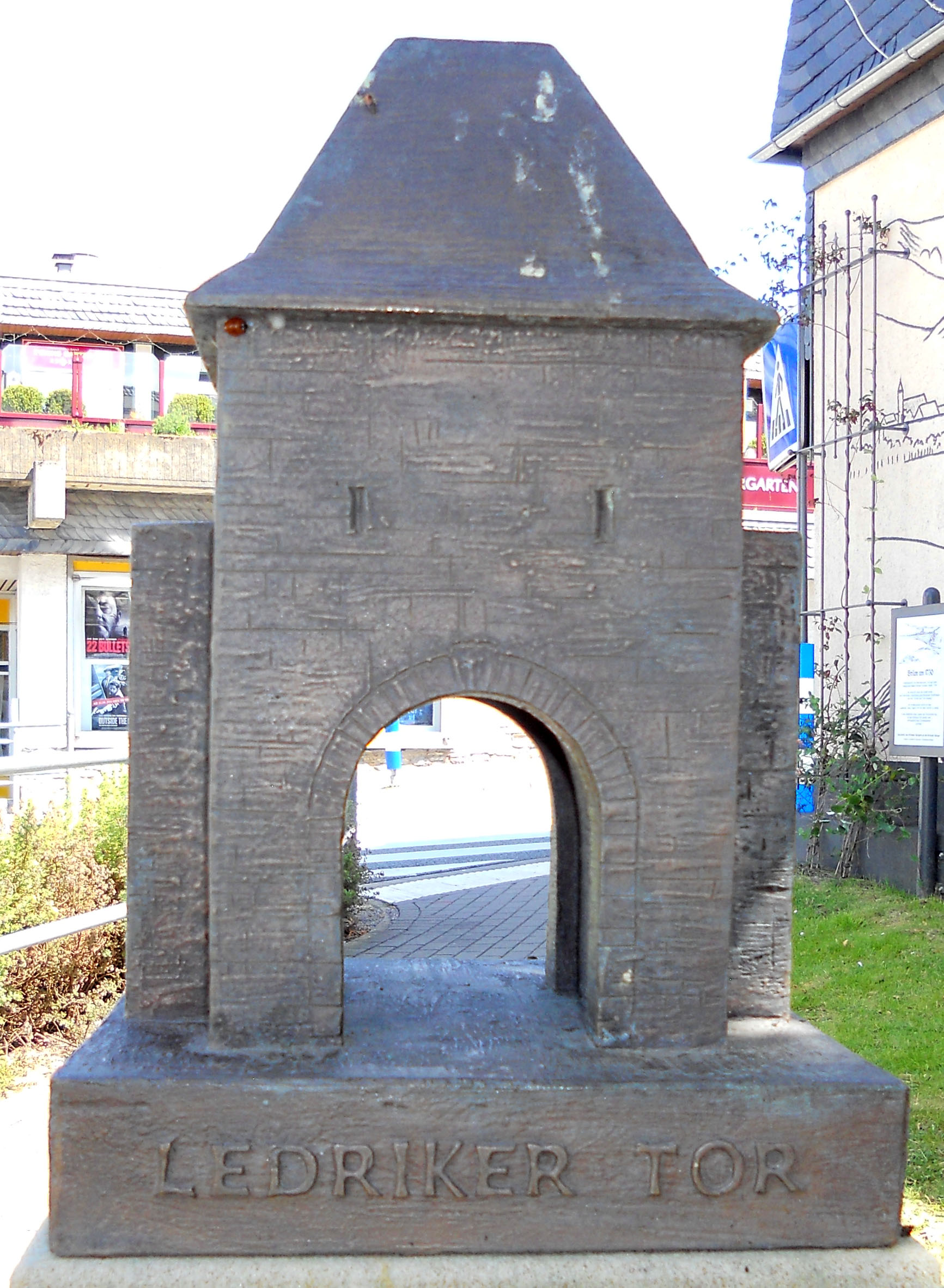 Ledriker Tor , Bronzenachbildung